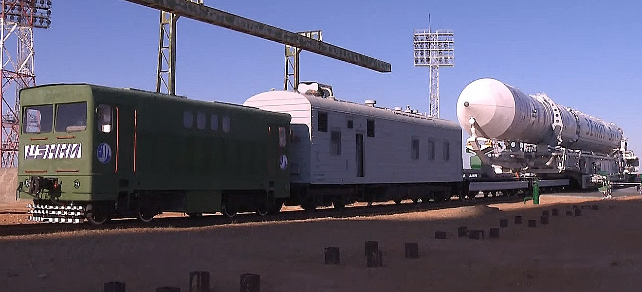 Безискровый аккумуляторный электровоз 11Т186 с поездом, перевозящим ракету "Зенит" около стартовой площадки